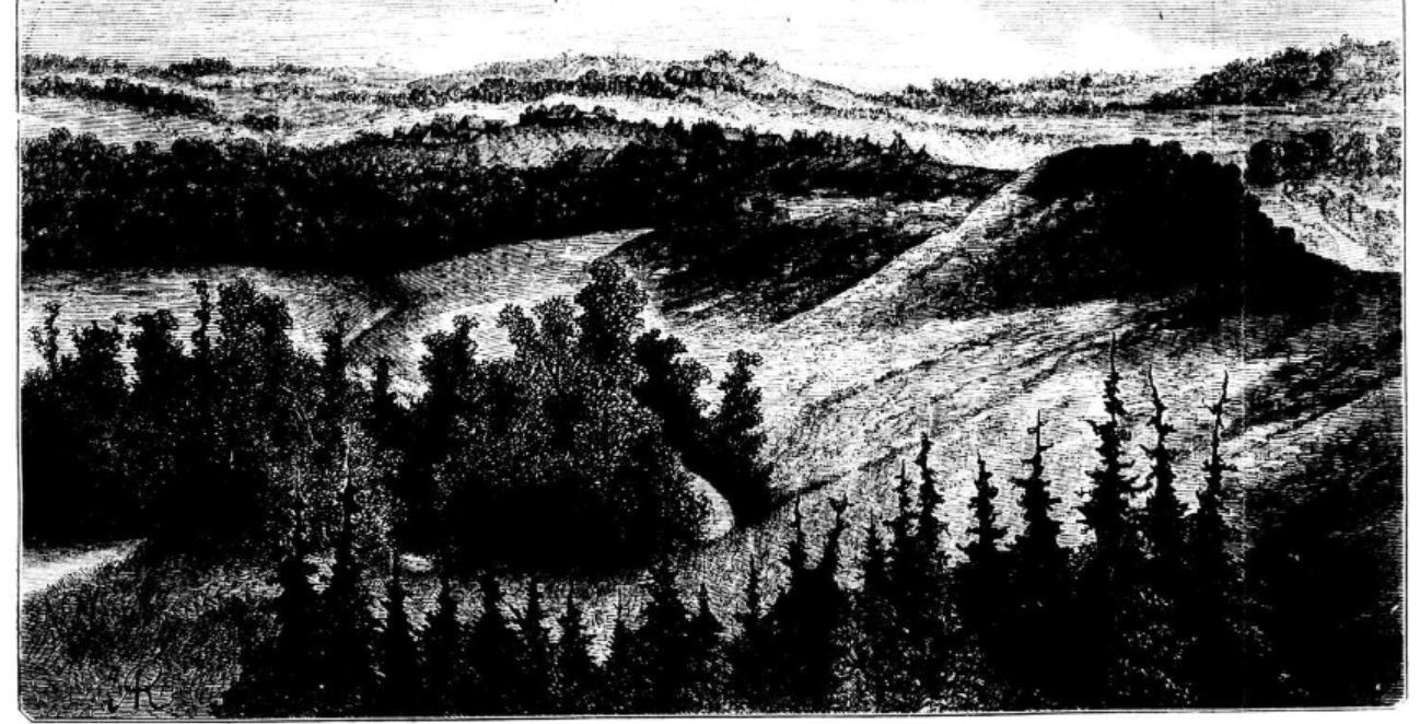 grodzisko wczesnośredniowieczne na terenie gminy Kulesze Kościelne.